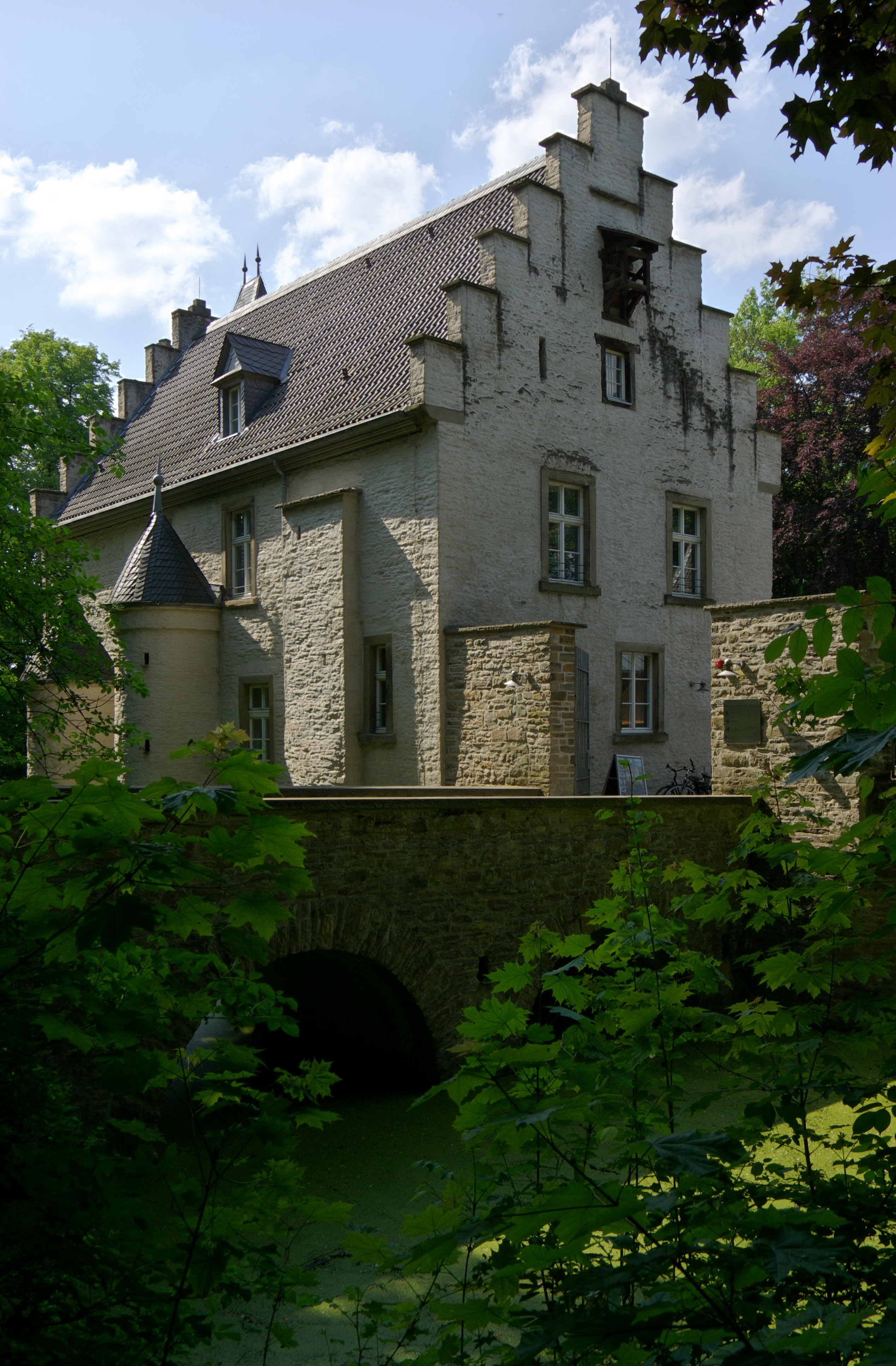 Wasserschloß Werdringen in Hagen-Vorhalle.